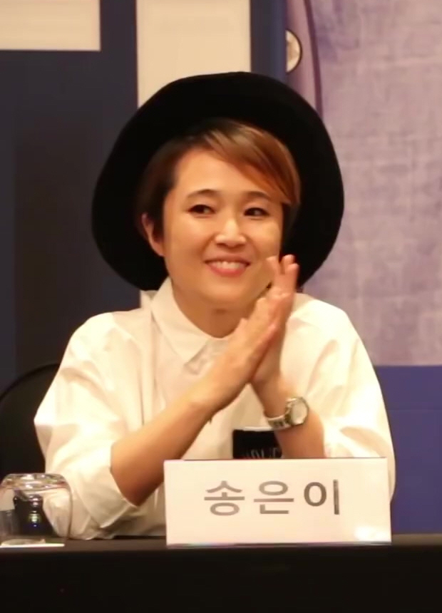 (TV10) 사이다 김영철=이영자는 자웅동체